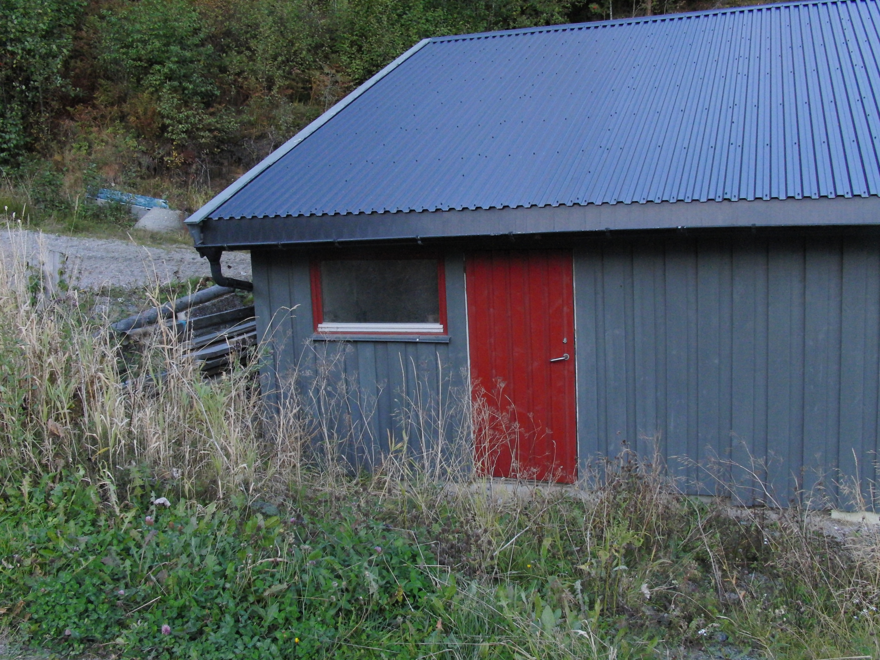 Brudalsbekken kraftverk